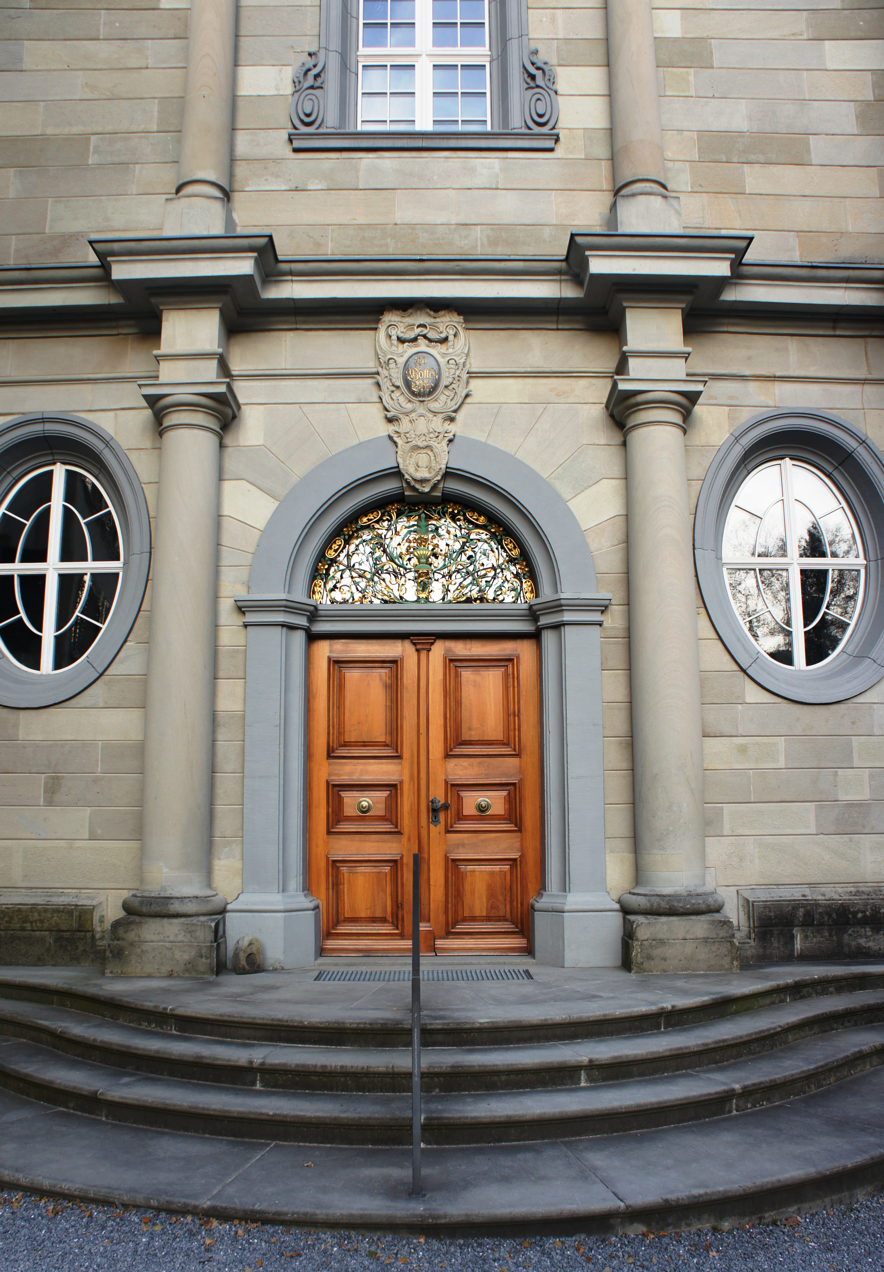 Blick aus Südwesten auf das Hauptportal der reformierten Kirche in Trogen. In einem mit verschiedenen Ornamenten verzierten Medaillon über dem Eingang ist in goldenem Schriftzug die übereinander gesetzten Worte zu lesen: Zu Gottes Ehr